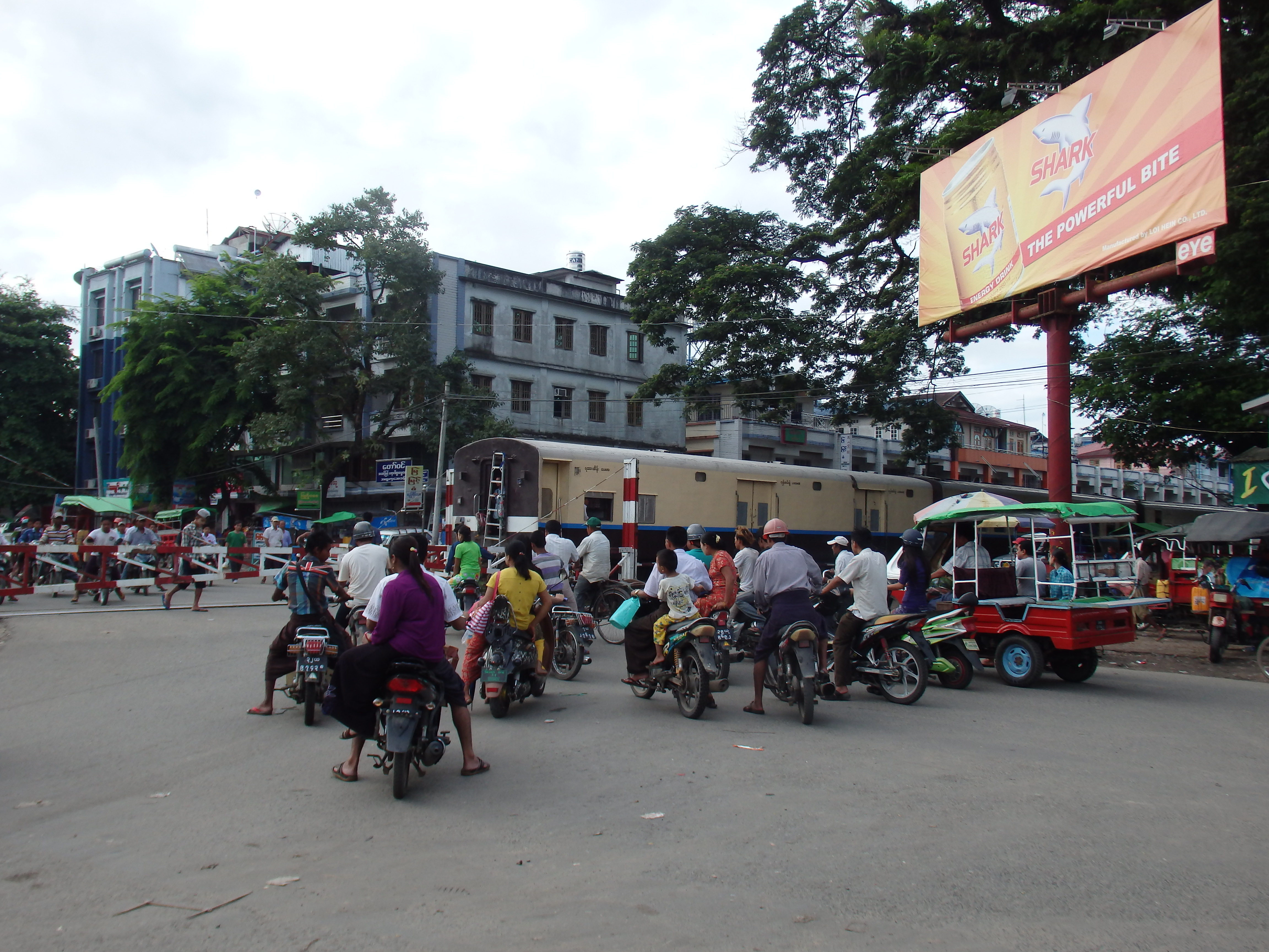 Myitkyina, Myanmar (Burma)